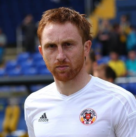 Александр Кобахидзе